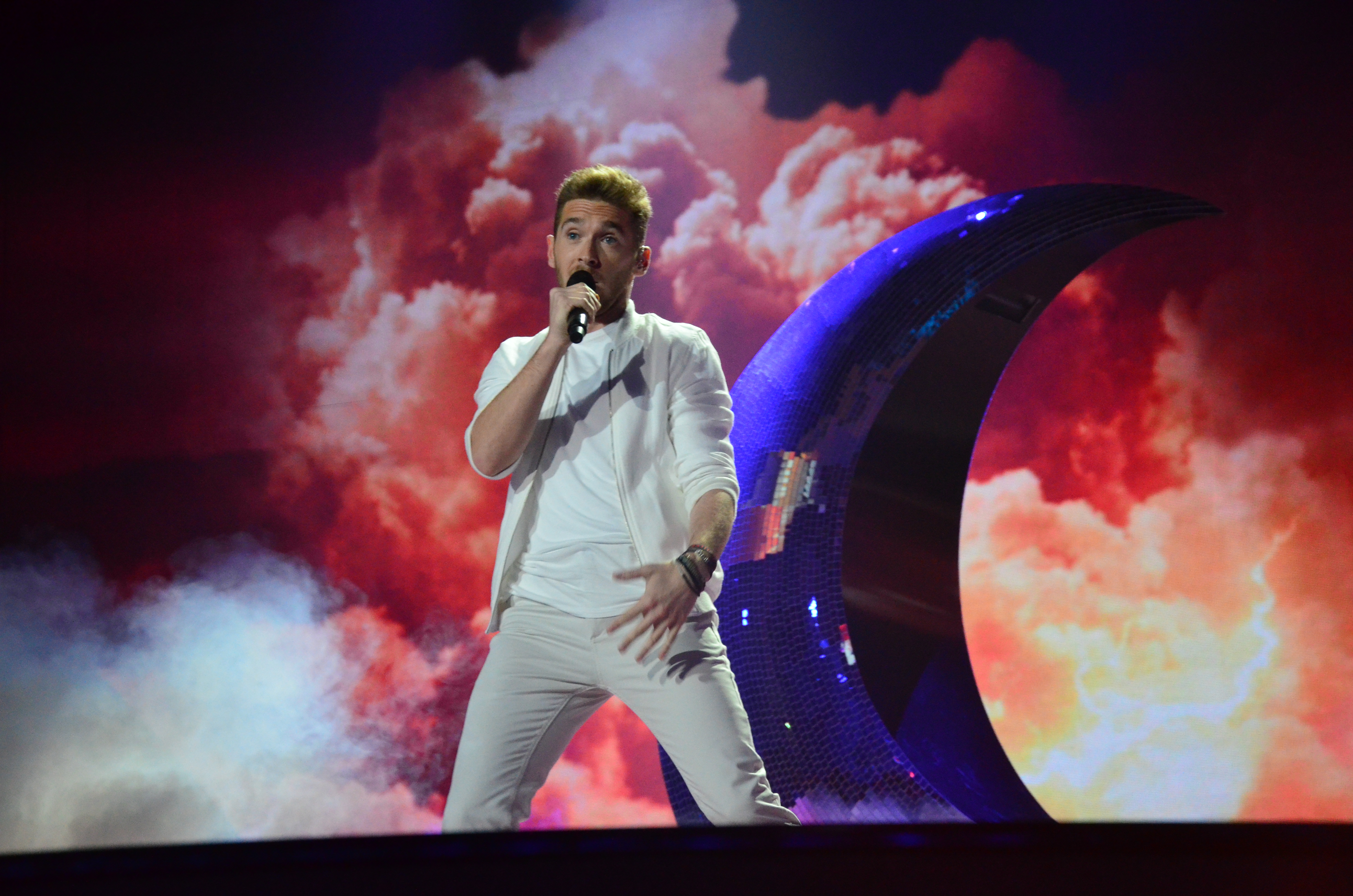 10 травня 2017 року у Києві відбулась генеральна репетиція 2 півфіналу "Євробачення".